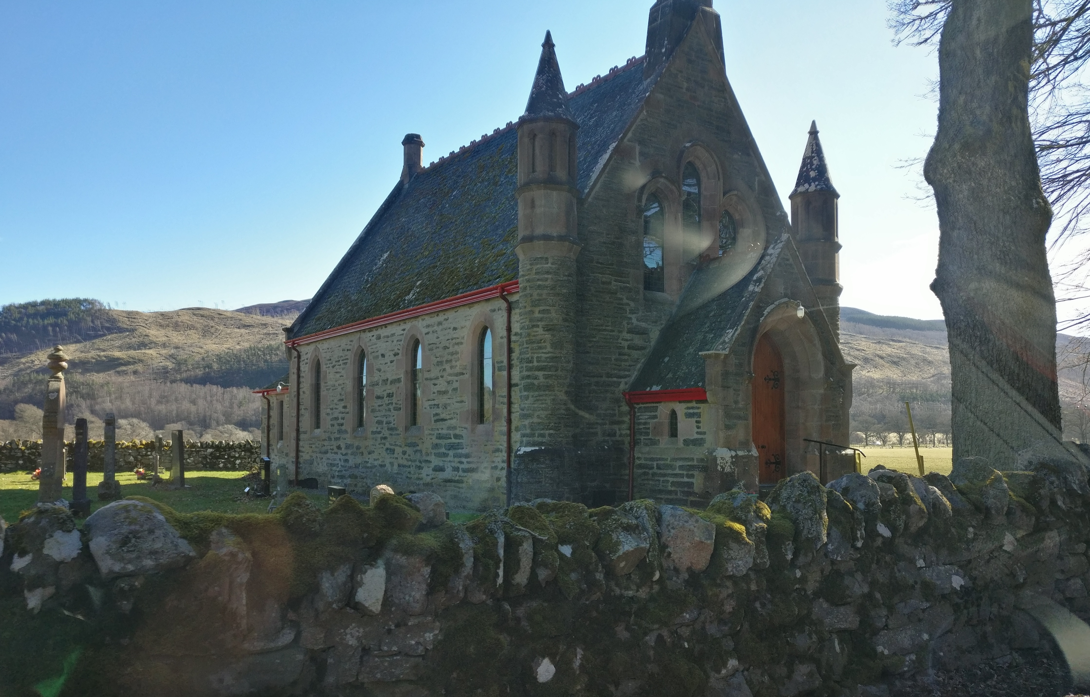 Struy Church